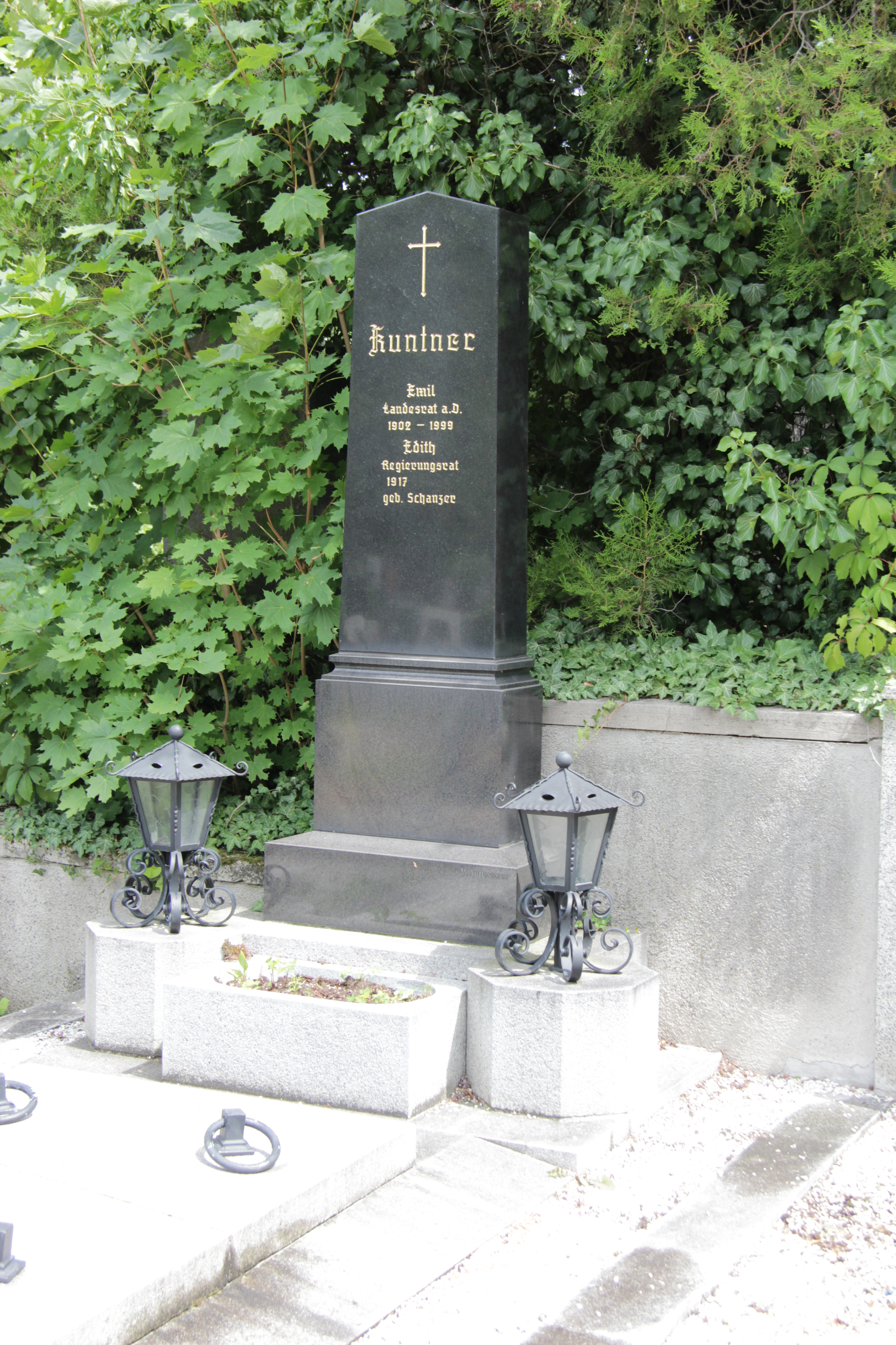 Friedhof in Mödling, Niederösterreich, Grab des Landtagsabgeordneten Emil Kuntner